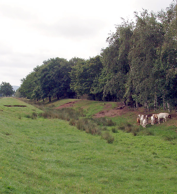 Munkekanalen ved Øm Kloster. (Gammel Rye Sogn, Tyrsting Herred, Skanderborg Amt) Image by user:Nico-dk / Nils Jepsen